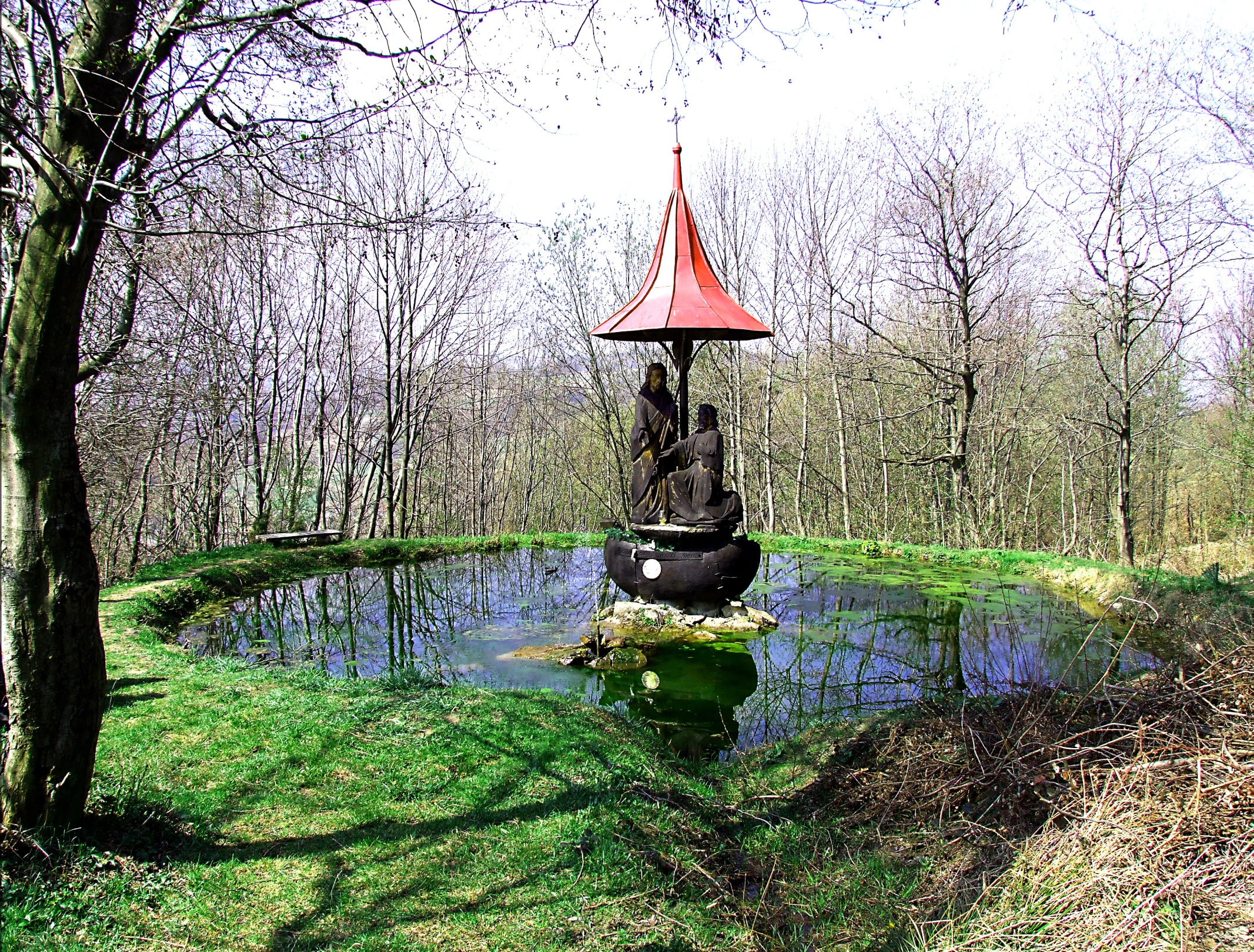 Kalwaria Tokarska w Tokarni (powiat myślenicki)